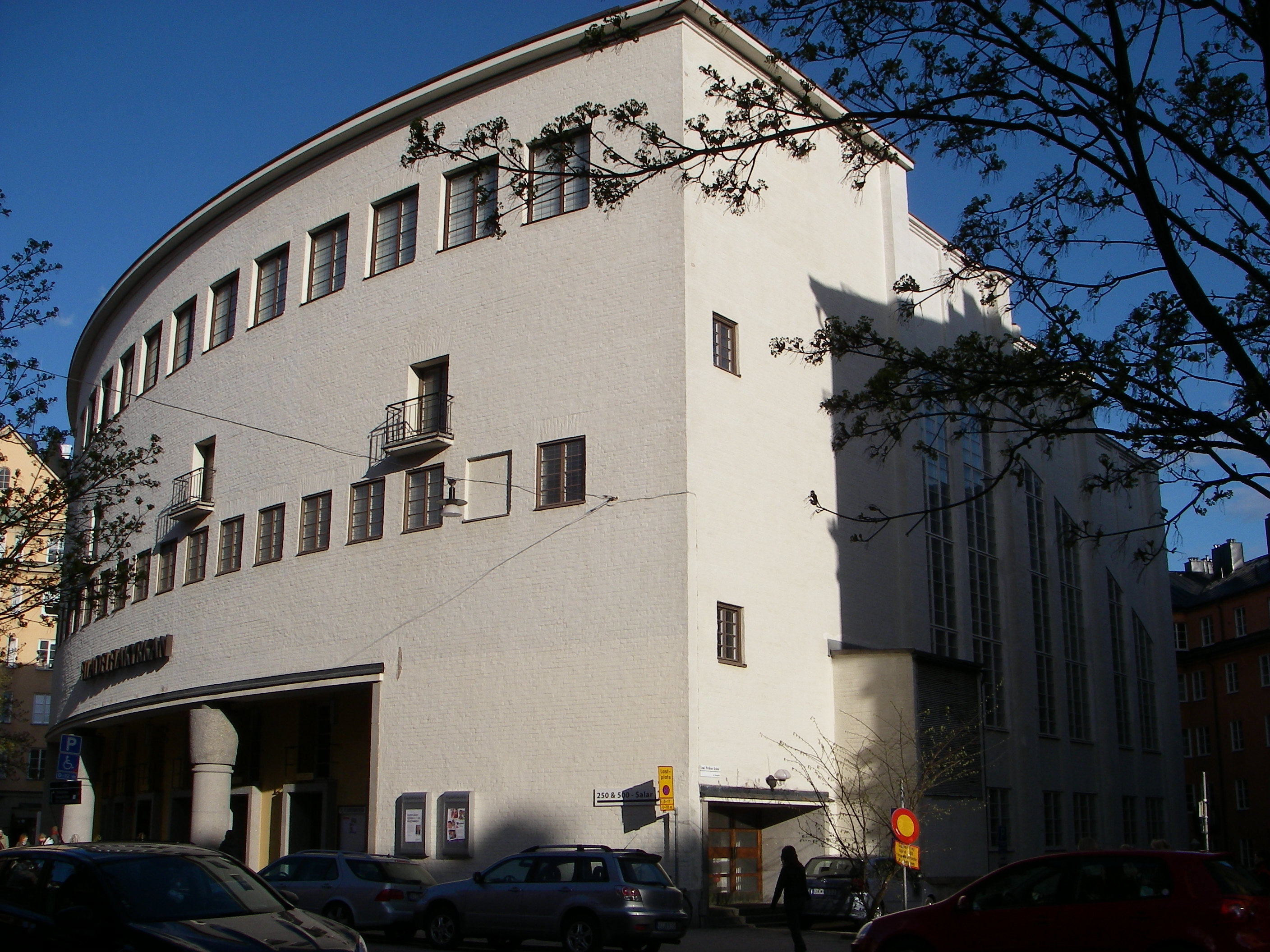 Filadelfiakyrkan på Rörstrandsgatan i Stockholm